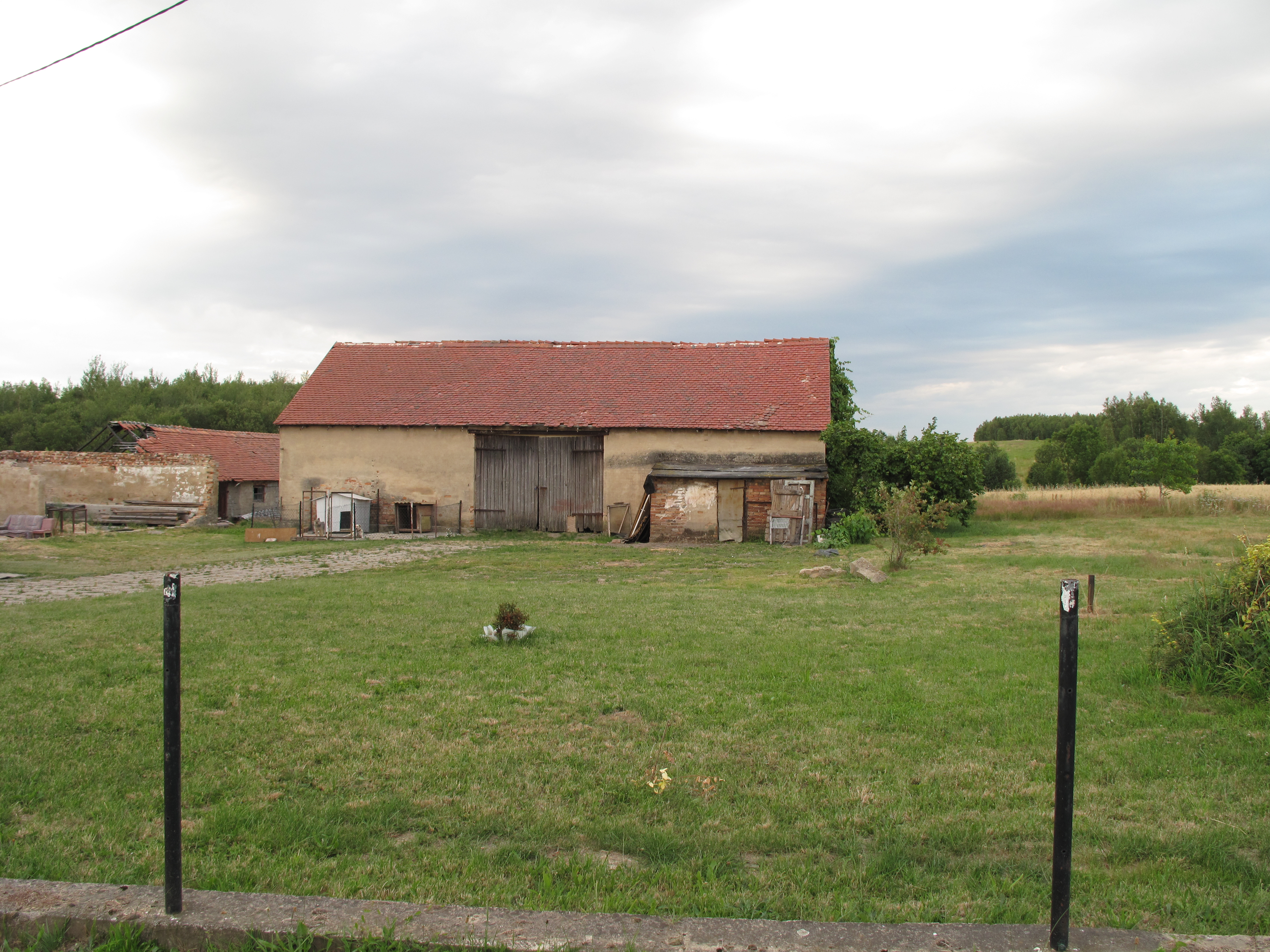 Wielichów. Polska.